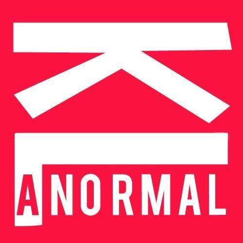 Anormaldekayland